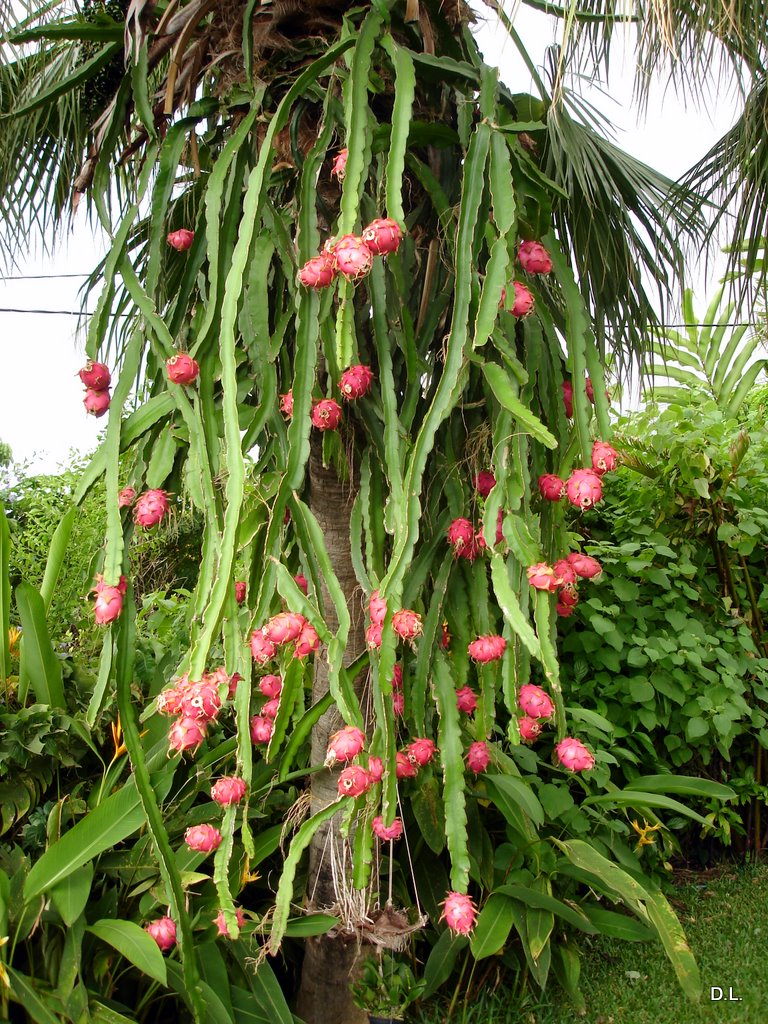 38 jours après la floraison